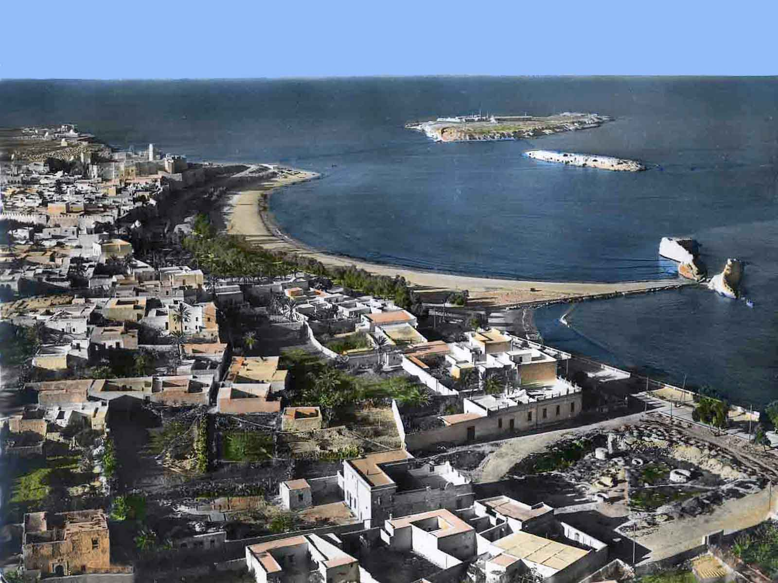 Monastir au milieu des année 1950 Bertrand Bouret